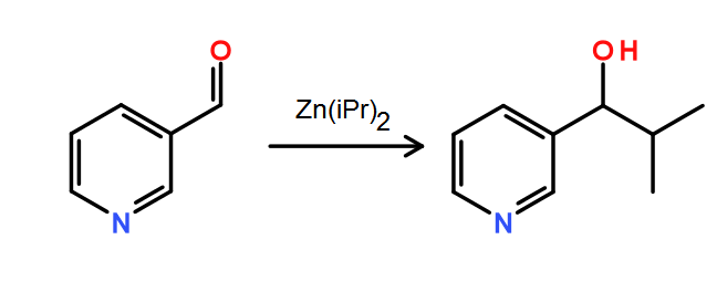 Voorbeeld van een Soai-reactie (alkylering van aldehyde met organozink)